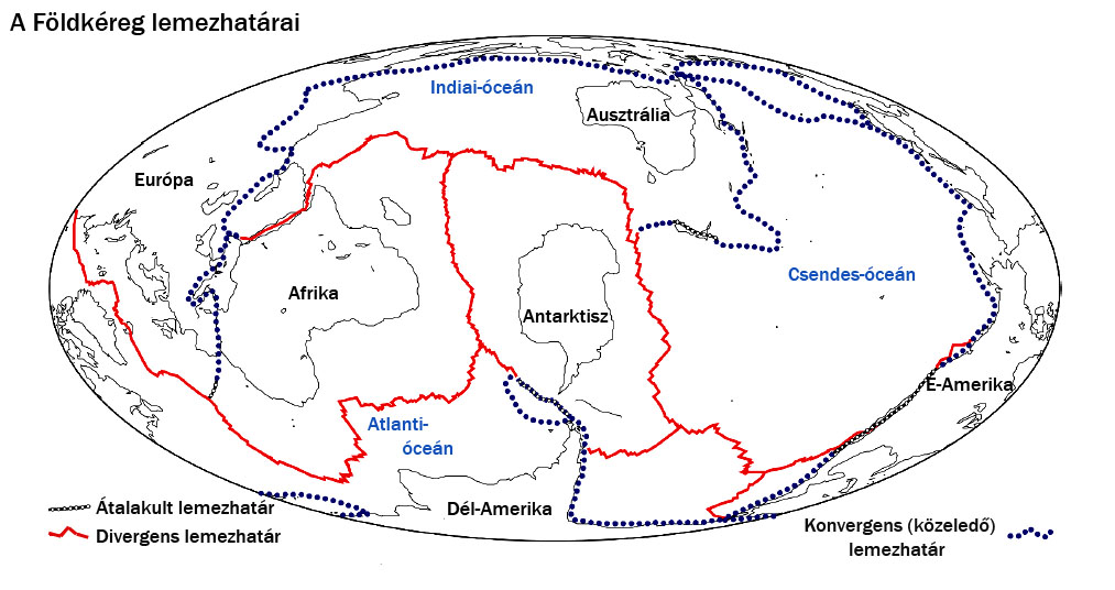 Lemezek határai Föld jelenlegi állapotában